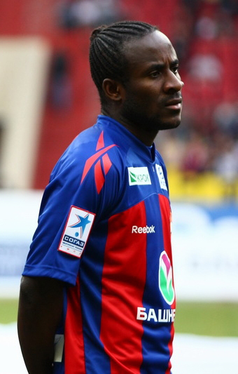 Думбия в 2012 году.